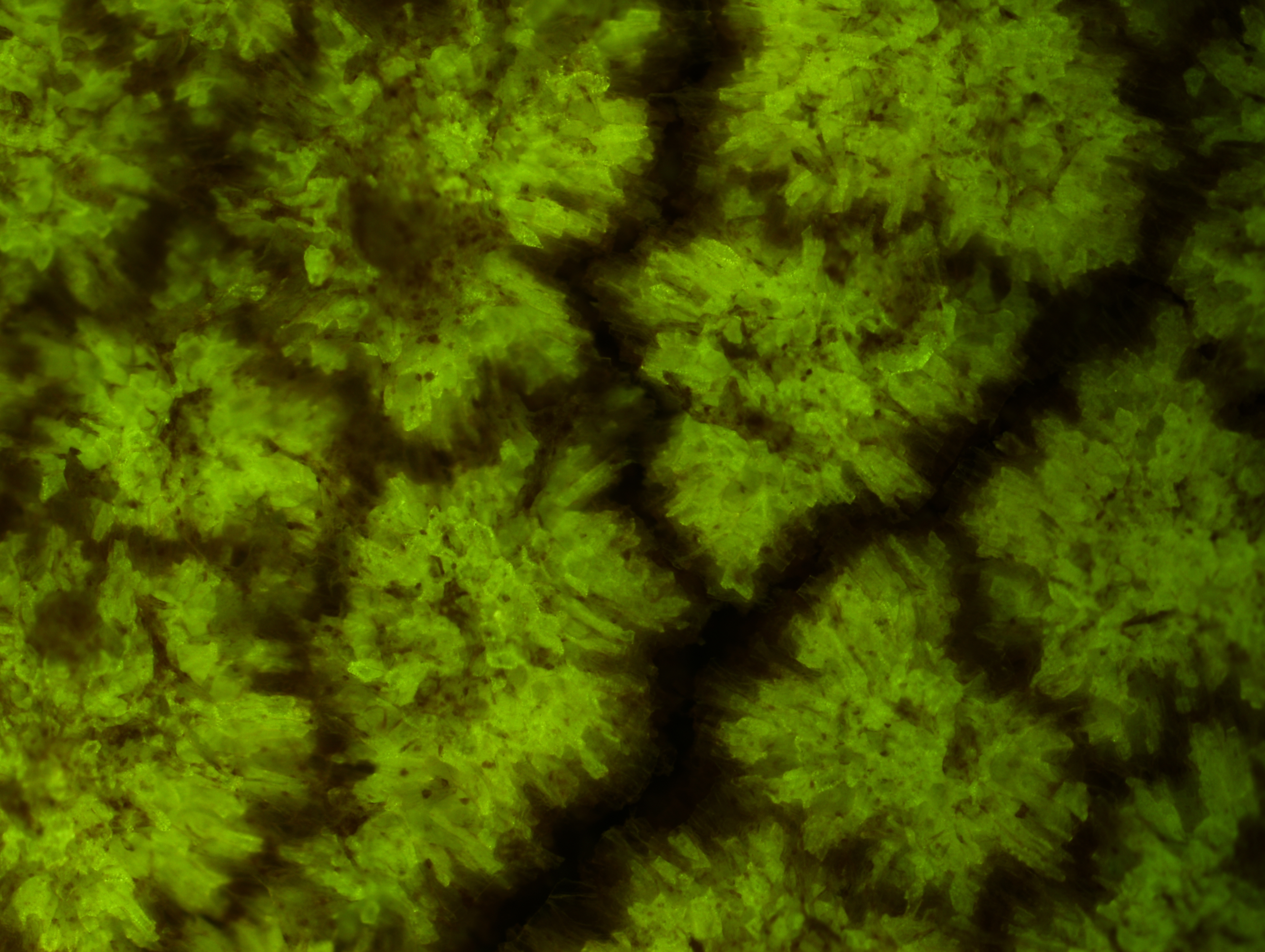 Vnitřní strana slupky plodu tamarindu indického (Tamarindus indica), foceno pod fluorescenčním mikroskopem.